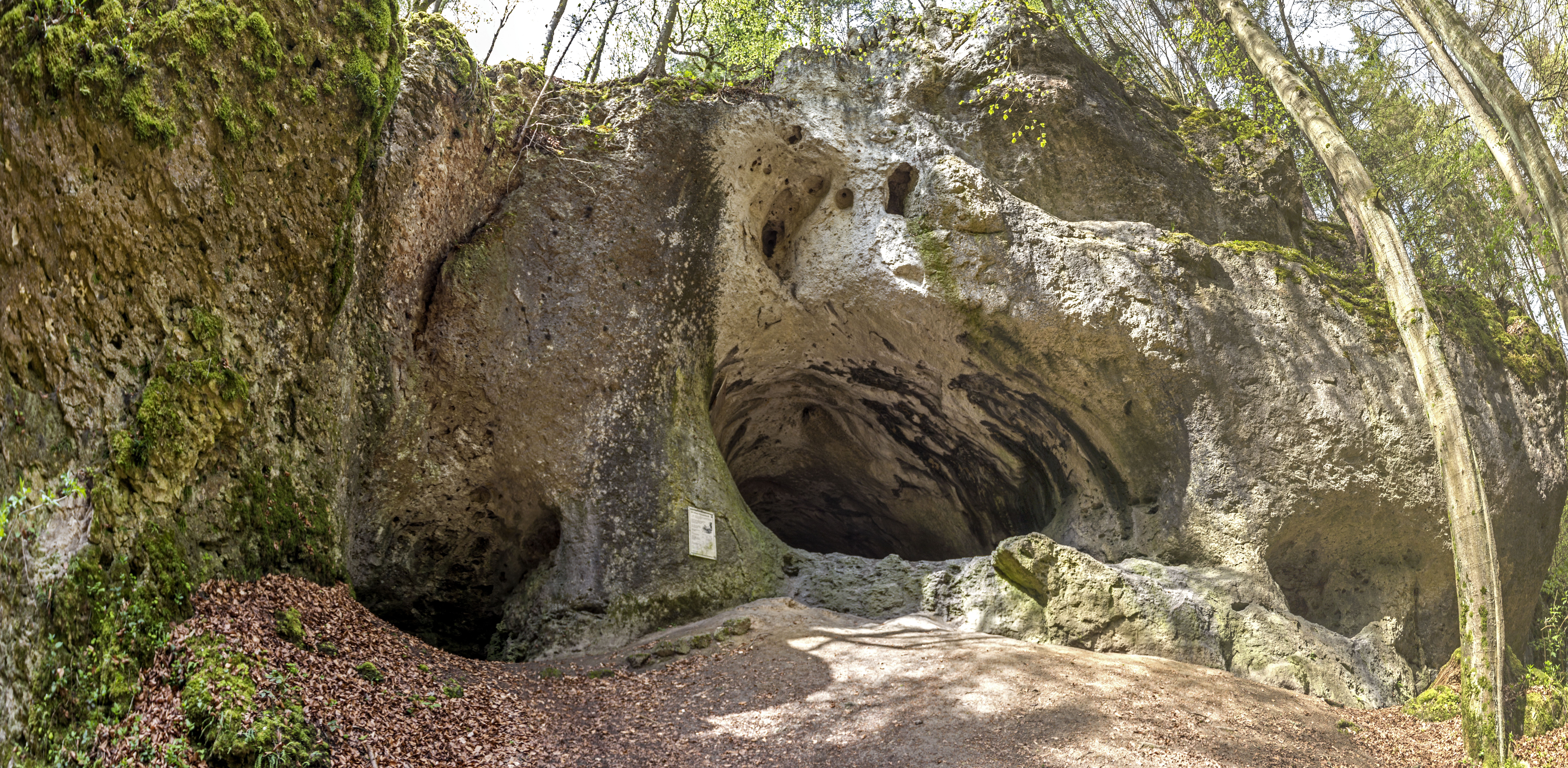 Großes Hasenloch, Höhle, D 92, Nationales Geotop Pottenstein